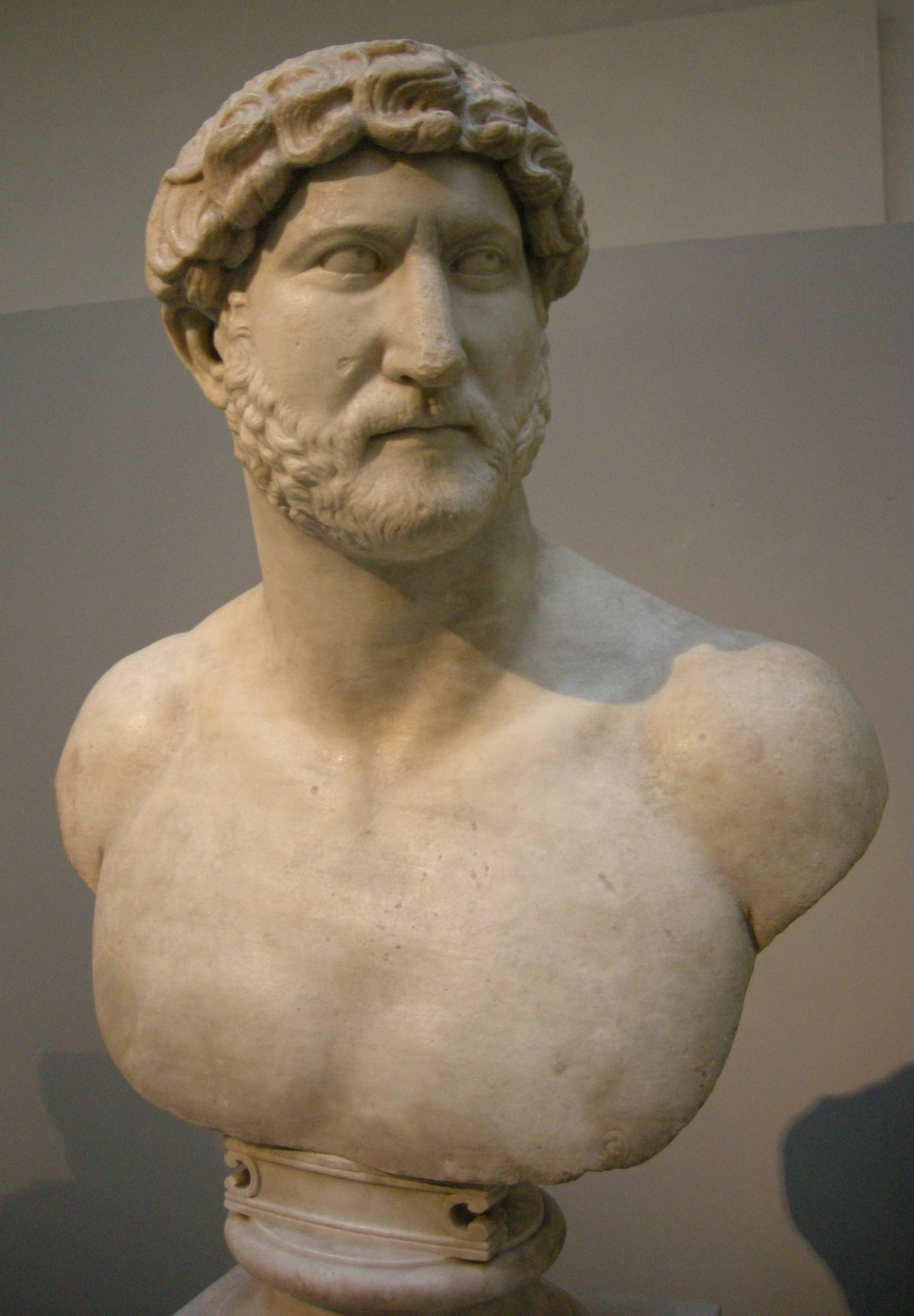 Arte romana, da roma, adriano, 117-138